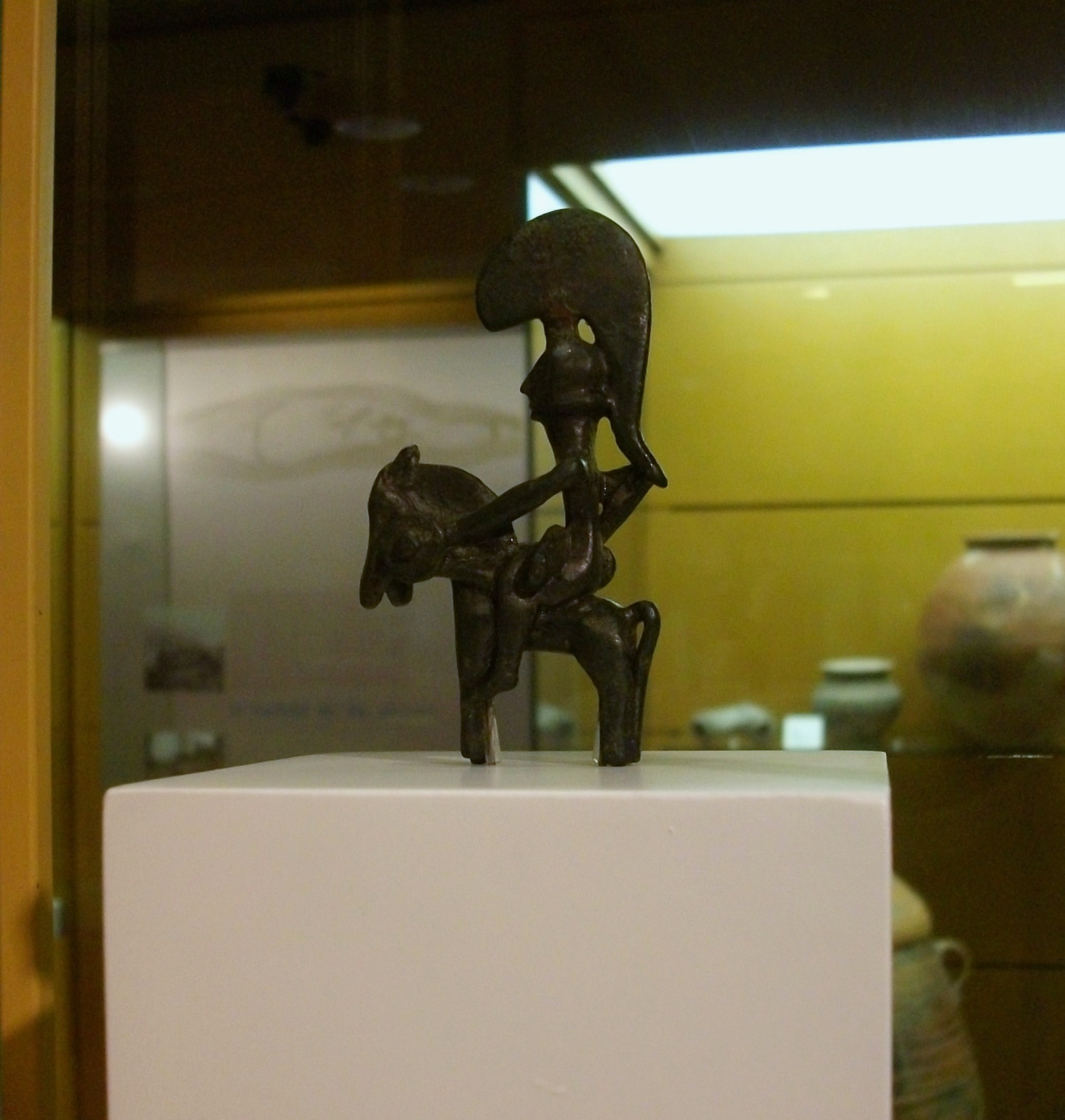 Guerrer de Moixent, figura de bronze fos que representa un guerrer a cavall, amb espasa, escut i casc amb gran plomall, s. IV aC.